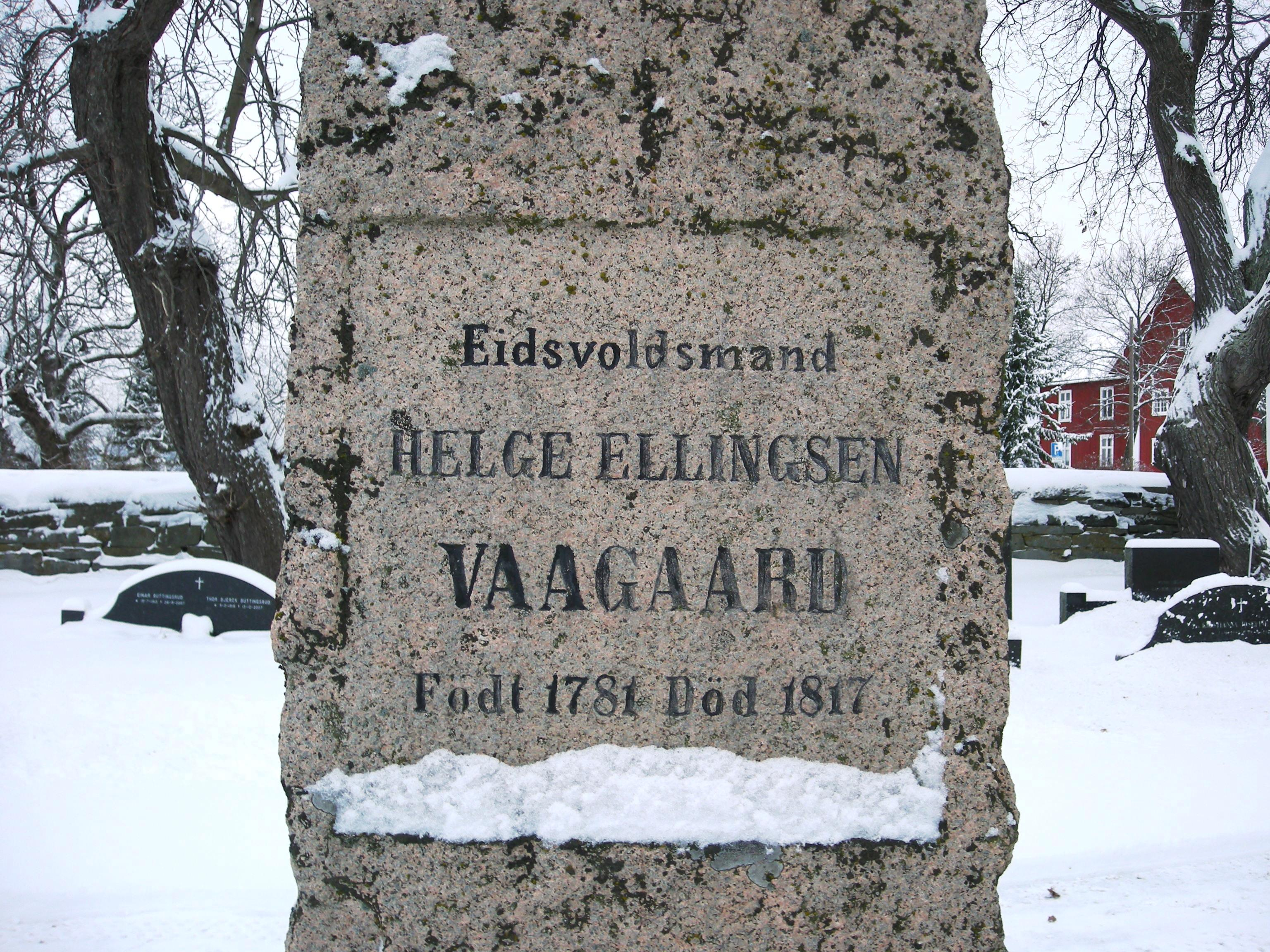 Minnesmerke over eidsvollsmannen Helge Ellingsen Vaagaard (eller Waagaard) ved Norderhov kirke